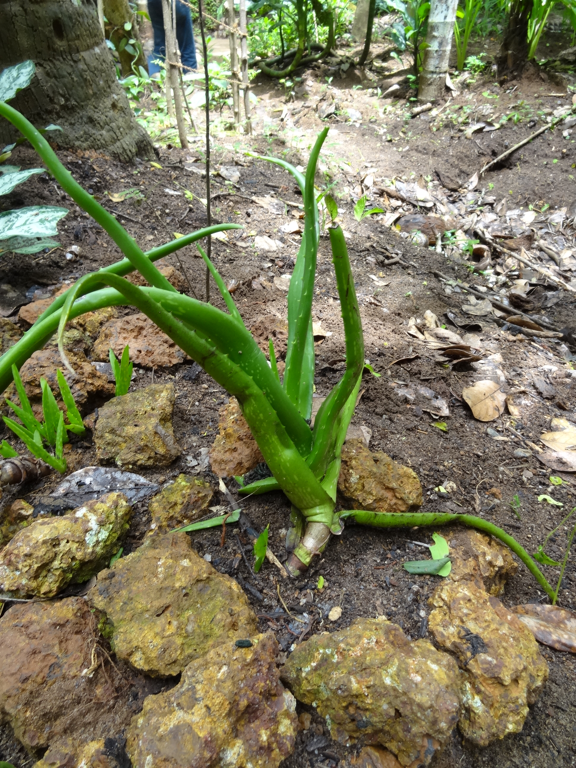 Spice & Herbal Garden - Palapathwela, Sri Lanka 05